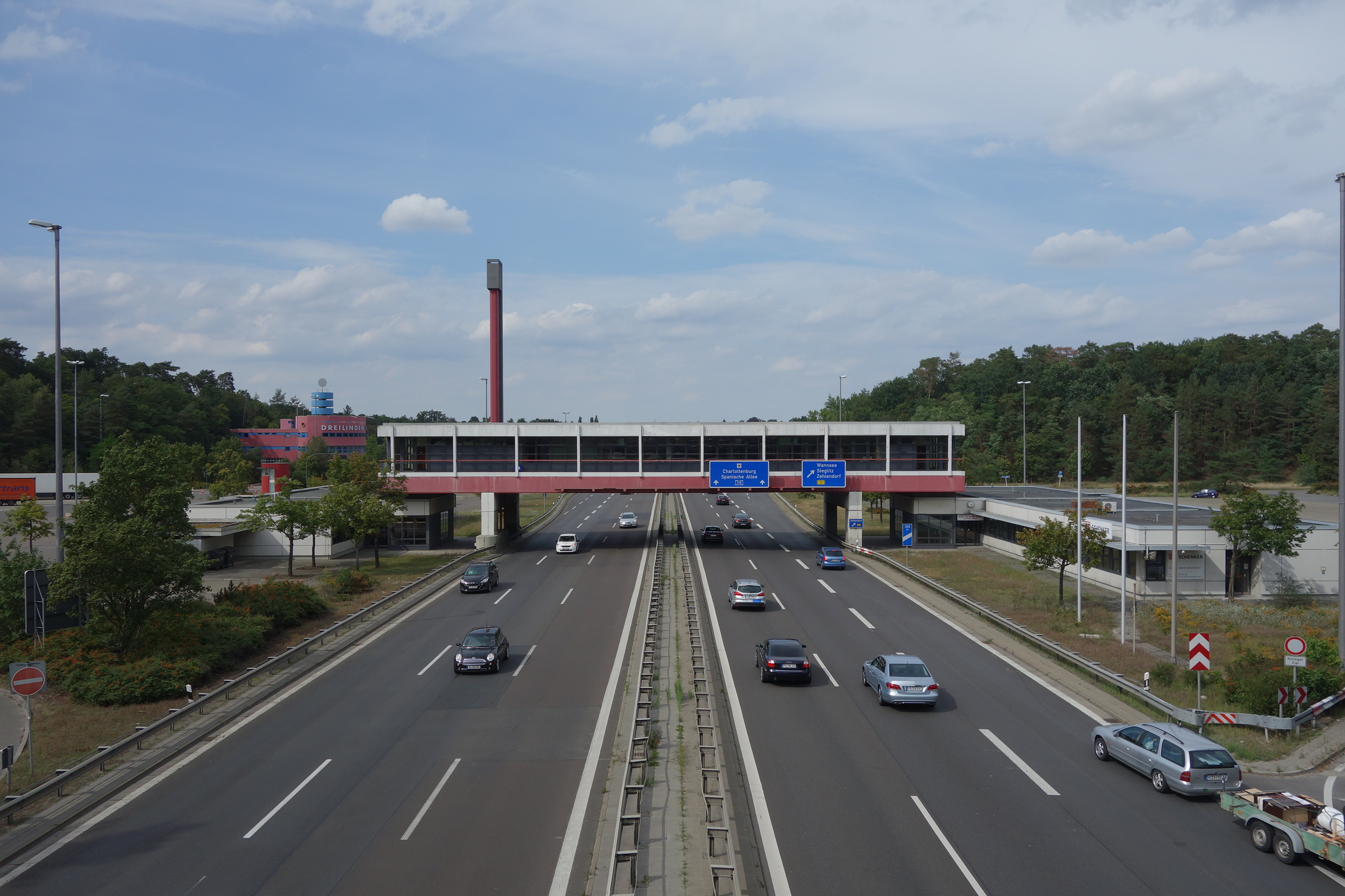 Bundesautobahn A115 mit Brückenhaus des früheren Checkpoint Drewitz-Dreilinden in Berlin